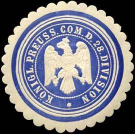 Sealing stamp Title: Königlich Preussisches Commando der 28. Division Description: blau, weiß, geprägt Place: Karlsruhe size: 4 cm